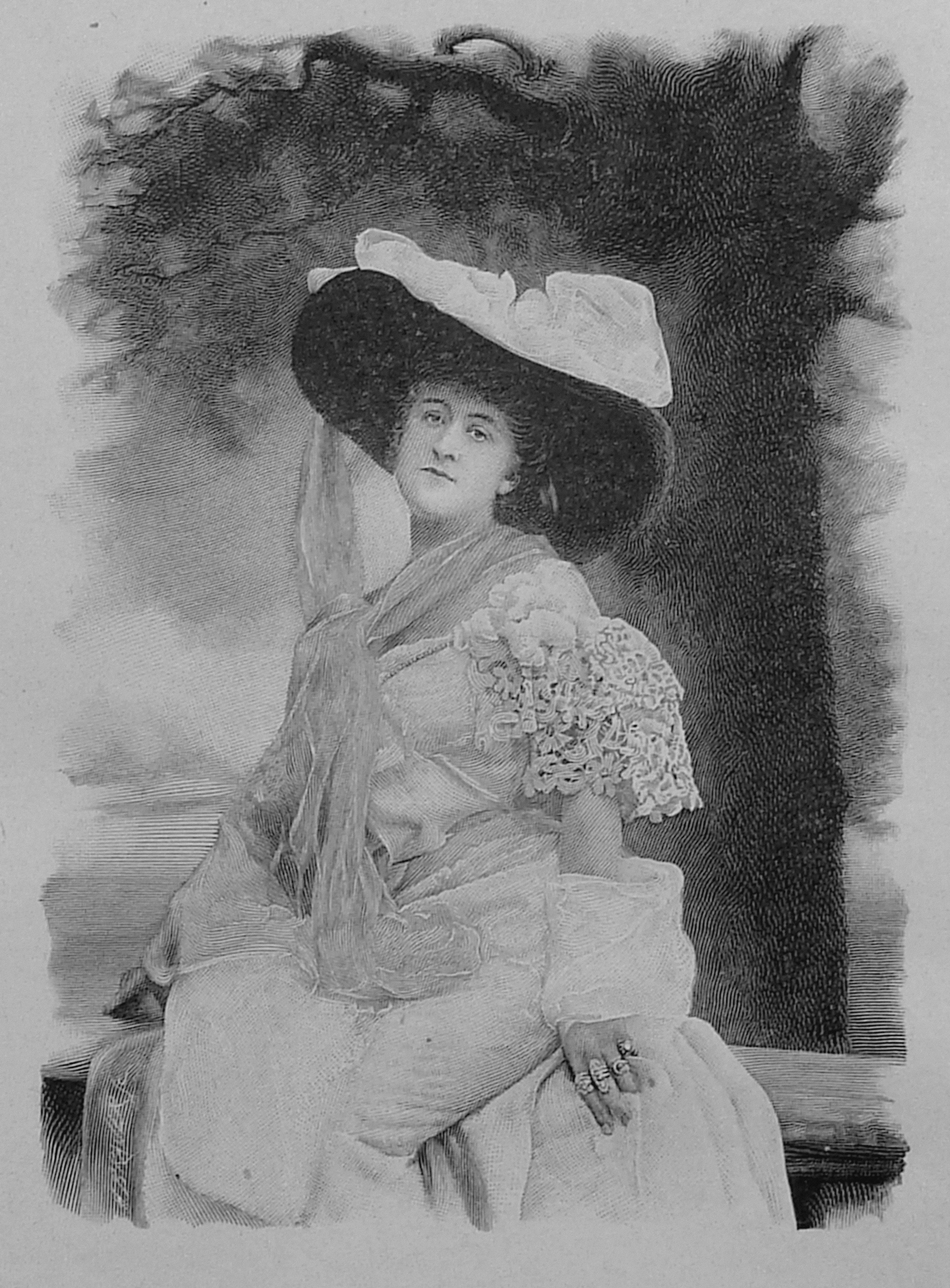 Nicolette Hennique, gravure d'après photo dans Figures contemporaines Album Mariani tome XI, 1908. graveur Henri Othon Brauer.